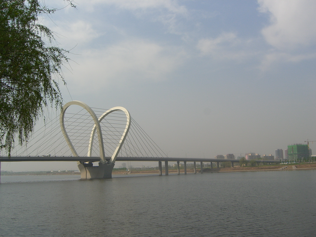 工农桥